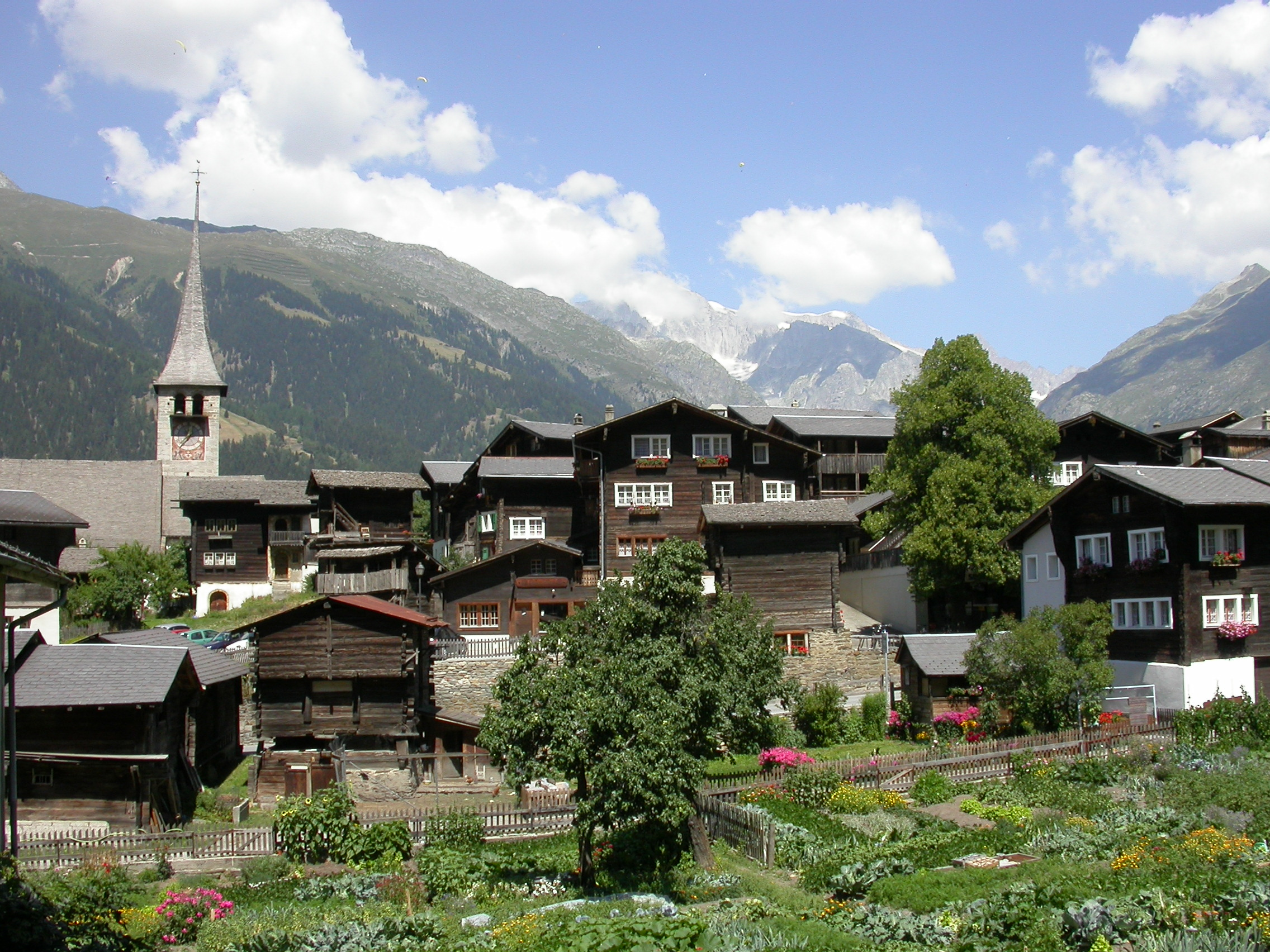 Blick auf das Musikdorf Ernen mit der St. Georg Pfarrkirche im Hintergrund